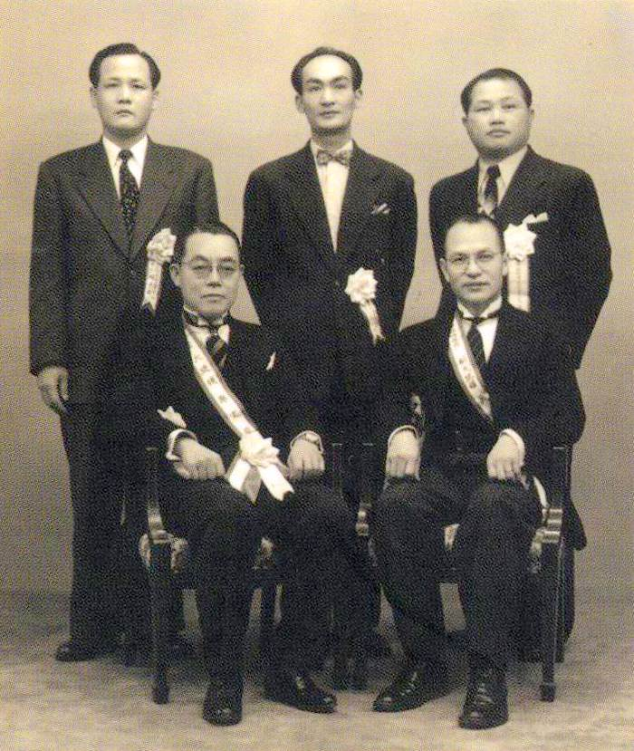 中文（台灣）: 台灣共和國臨時政府成立合影